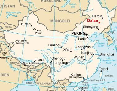 Lage von Daan